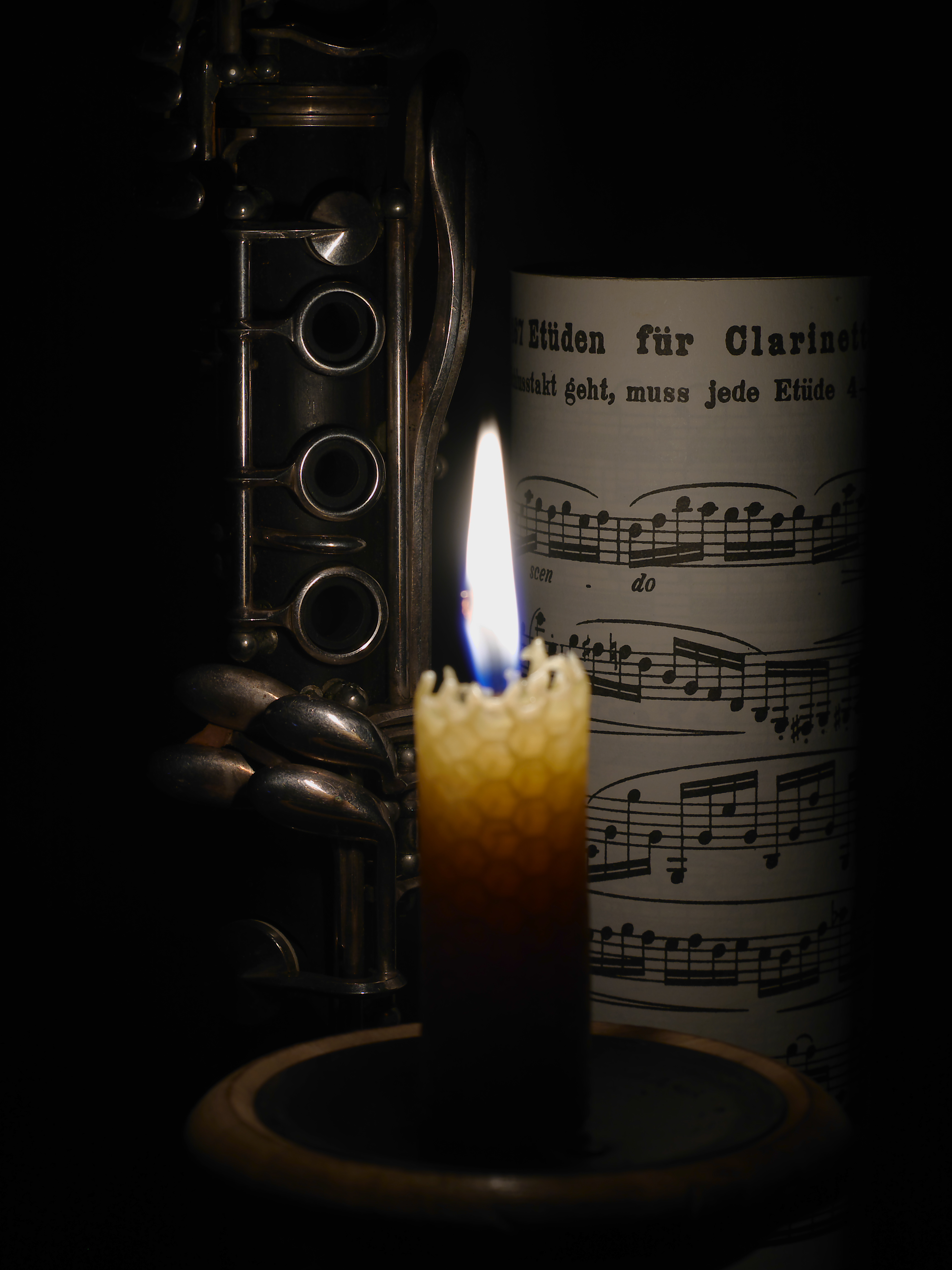 Aufnahme mit Kerzenlicht bei sehr hohem Kontrast zwischen Flamme und Hintergrund: Belichtungswert EV=3,6. Bittiefe 14 Bit pro Bildpunkt aus Rohdaten in das 8-Bit-JPEG-Format übertragen.